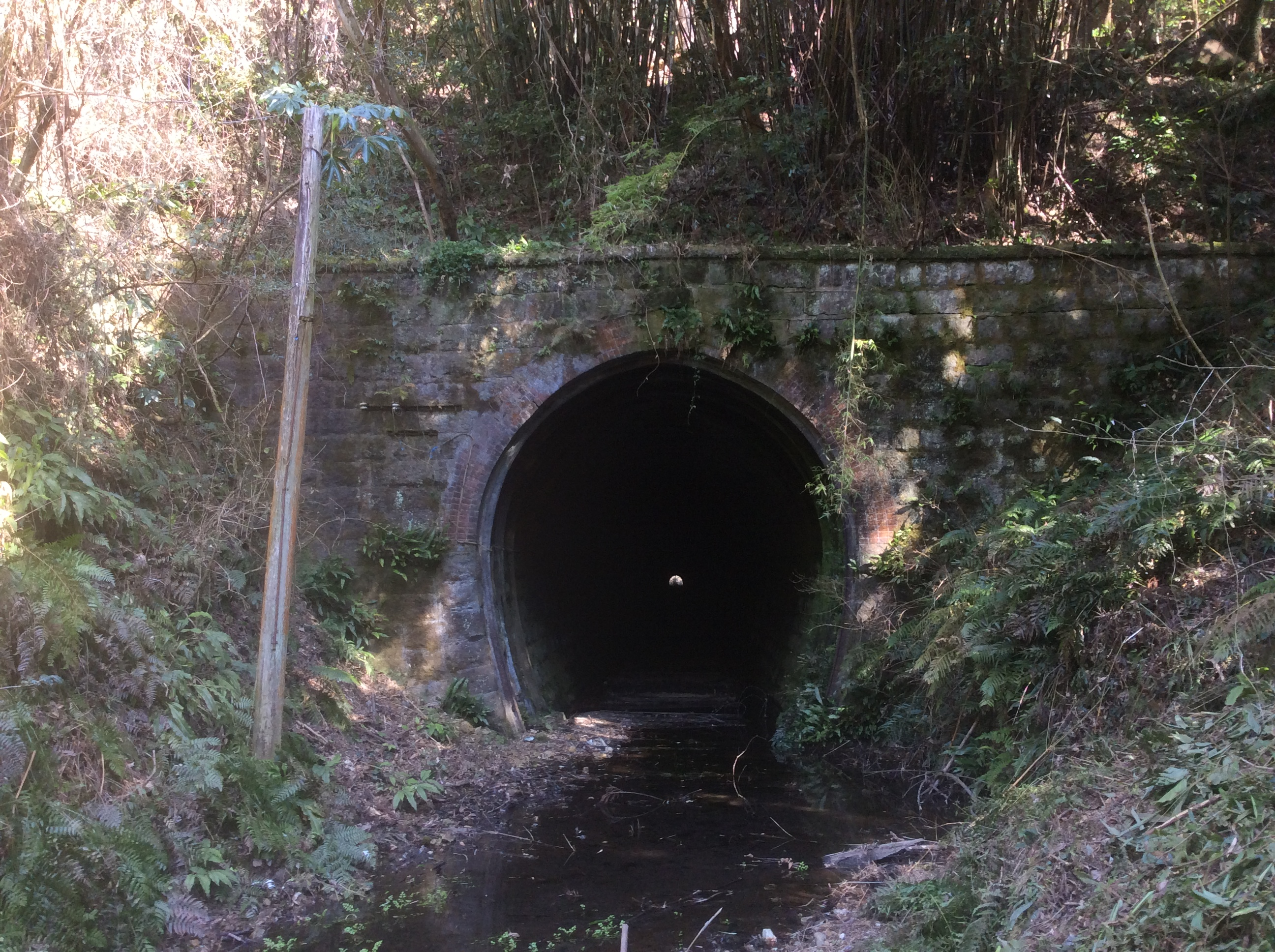 上日置駅～伊集院駅間。上日置駅はこの トンネルを超えるための給水や交換駅でも あった。